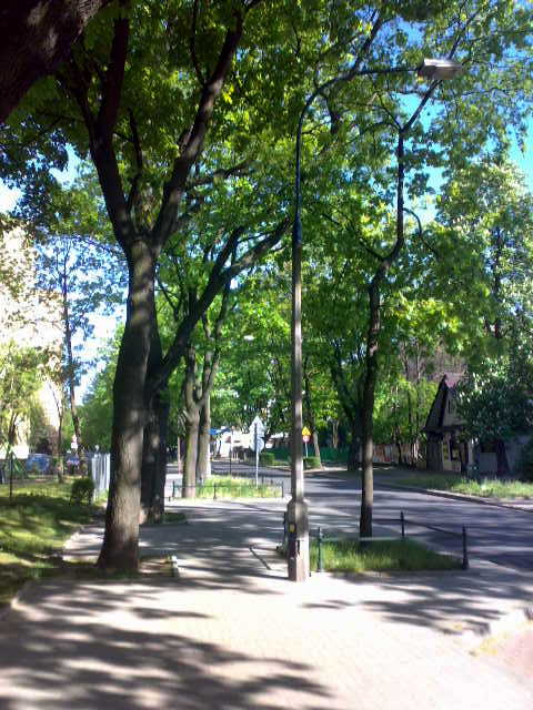 Widok ze skrzyżowania ulicy Mazowieckiej i Kmiecej w Krakowie